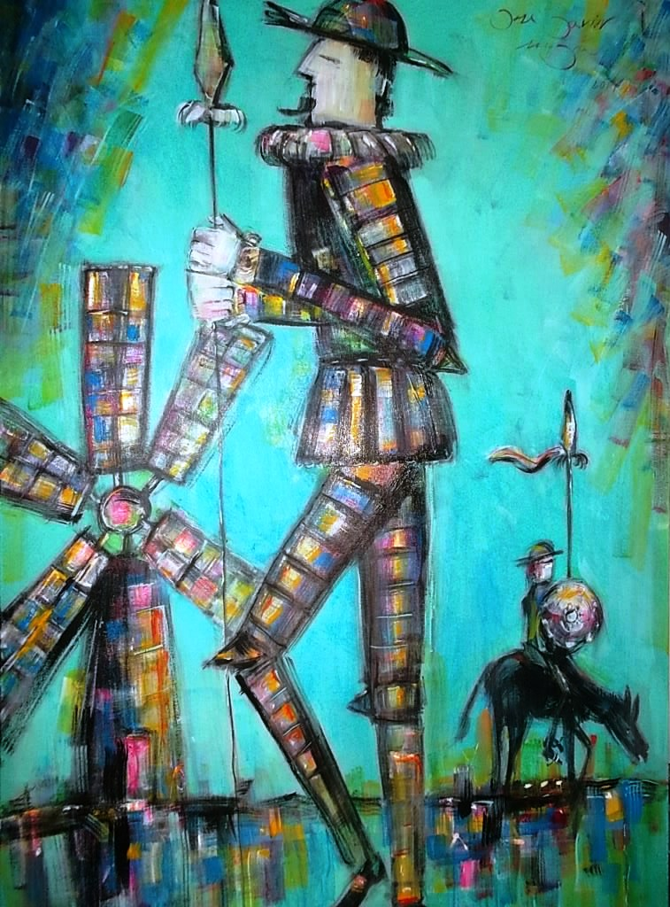 El Quijote This work has been released into the public domain by its author, yesvari85. This applies worldwide. In some countries this may not be legally possible; if so: yesvari85 grants anyone the right to use this work for any purpose, without any conditions, unless such conditions are required by law.